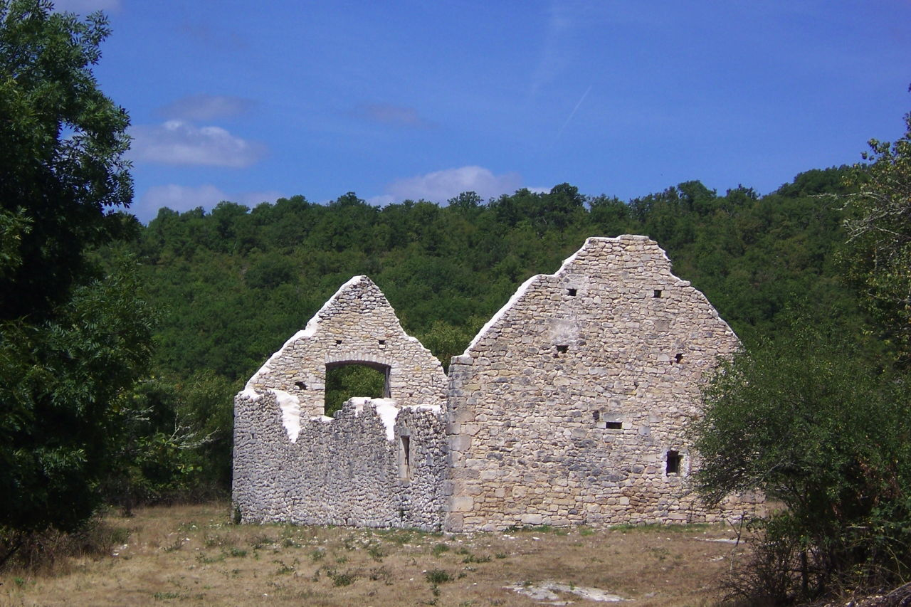 Reste de la grange cistercienne de Saint-Sauveur après son incendie. Le bâtiment a été consolidé par le Conseil Général qui est maintenant le propriétaire du site.